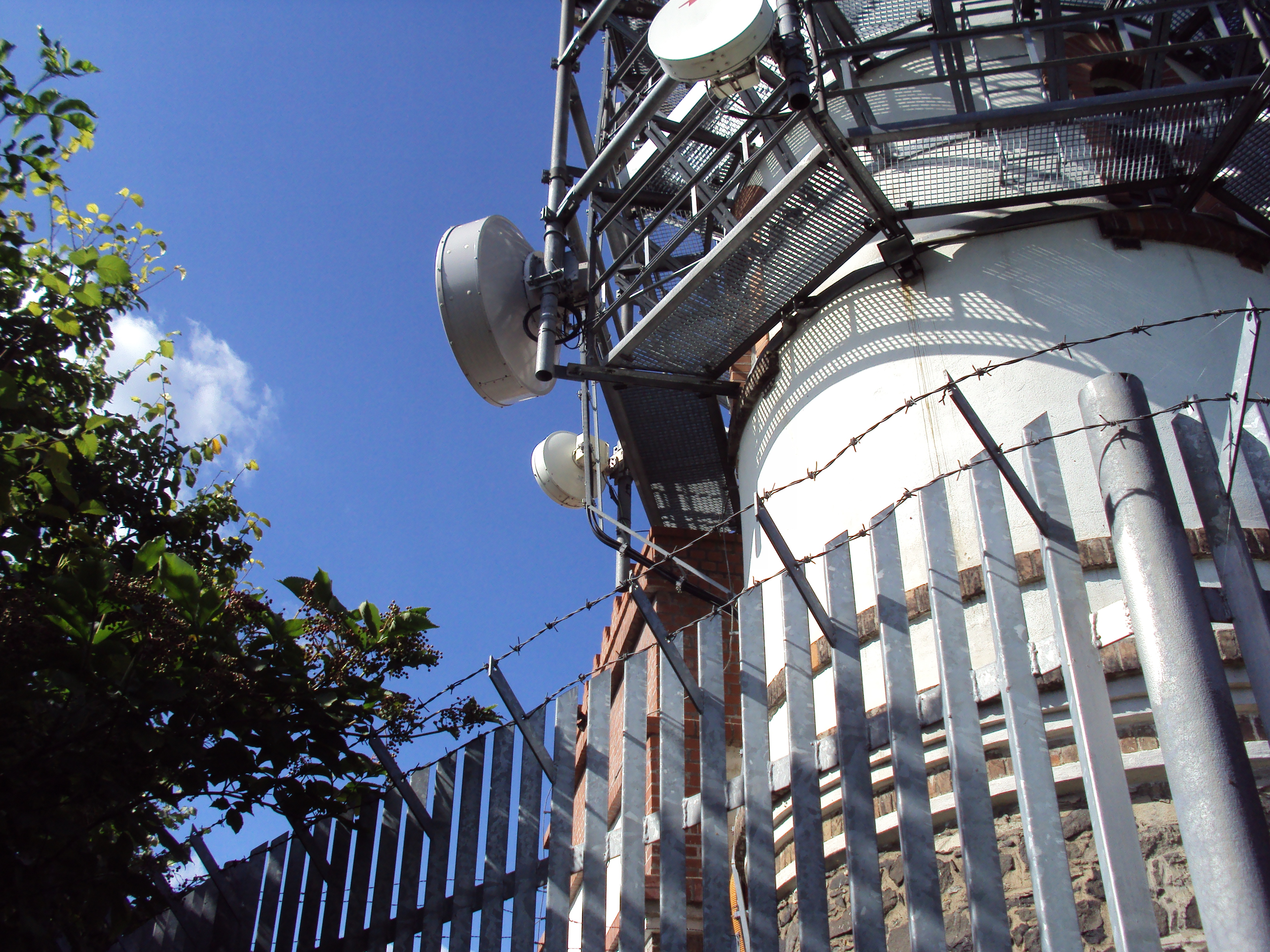 Na vrcholu českolipského Špičáku je veřejnosti nepřístupná rozhledna, přetvořená na vysílač radiokomunikací